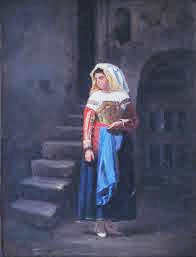 Napolitana; Pascual Ortega Portales (1839-1899)